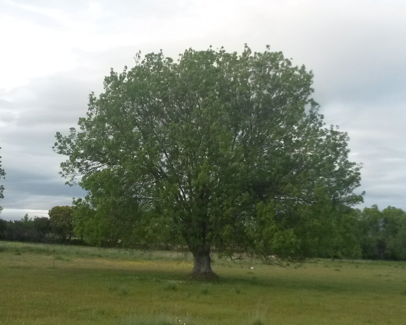 Ejemplar de fresno (Colmenar Viejo) (España)